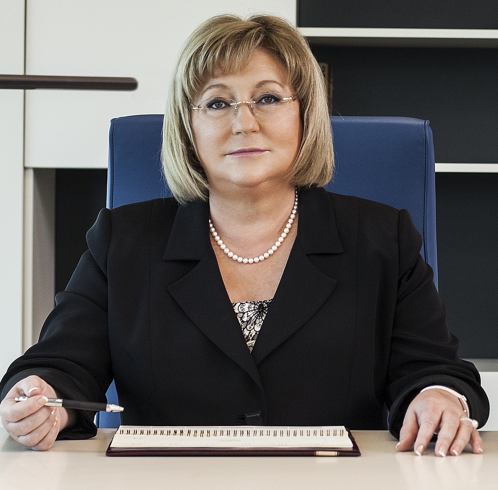 проф. Антоанета Василева